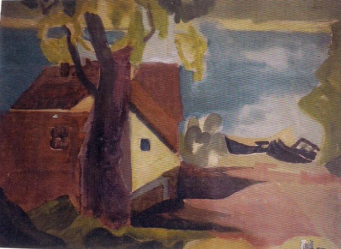 Gemälde von Maria Lemmé, vermutlich aus deren Stuttgarter Zeit